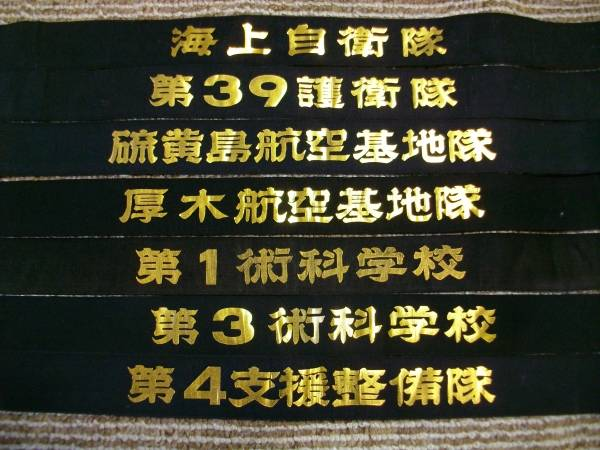 ペンネント各隊名